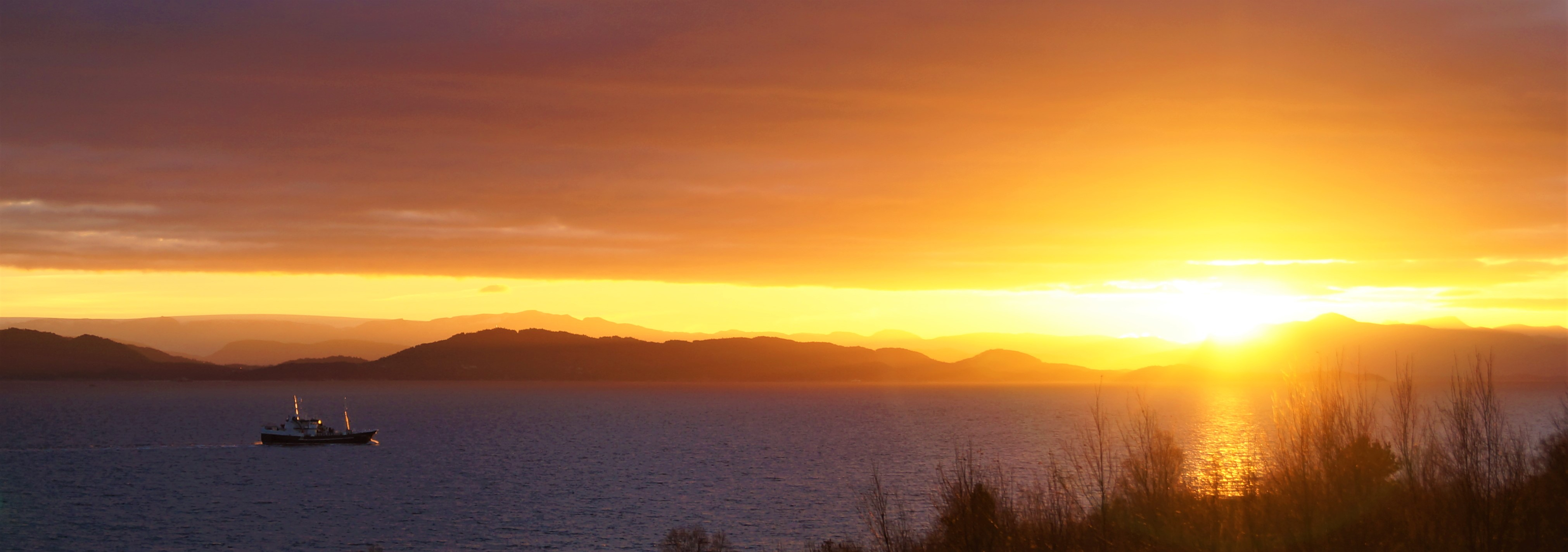 «Ringaskjær» i Korsfjorden